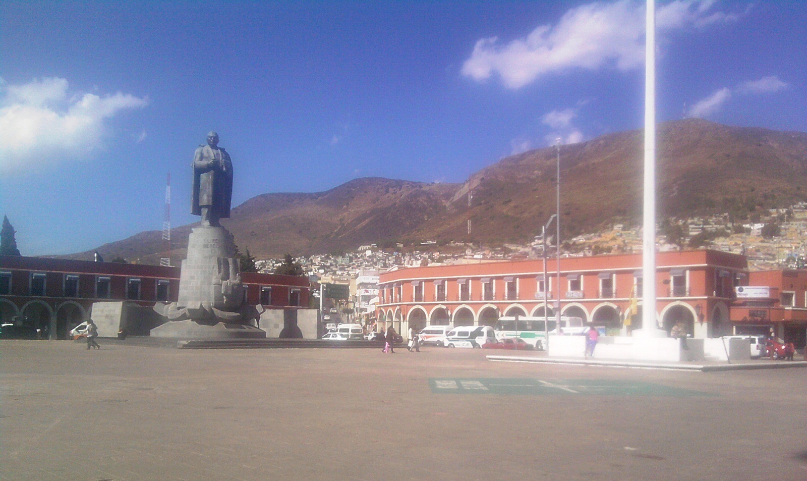 Plaza Júarez (Pachuca)